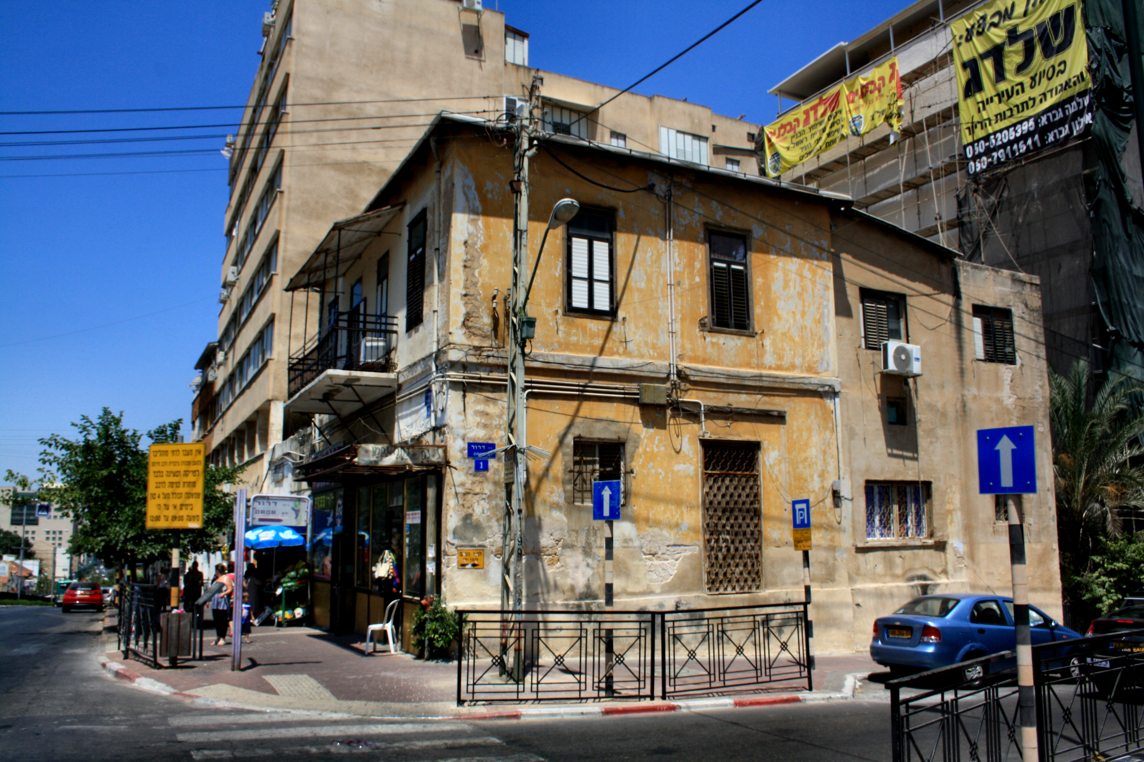 בית פרימן, רחוב רוטשילד 2 פינת הדרור 1, ראשון לציון. ניתן לראות את תוספות הבניה המאוחרות שנוספו בצמוד לחזיתו האחורית של המבנה המקורי.